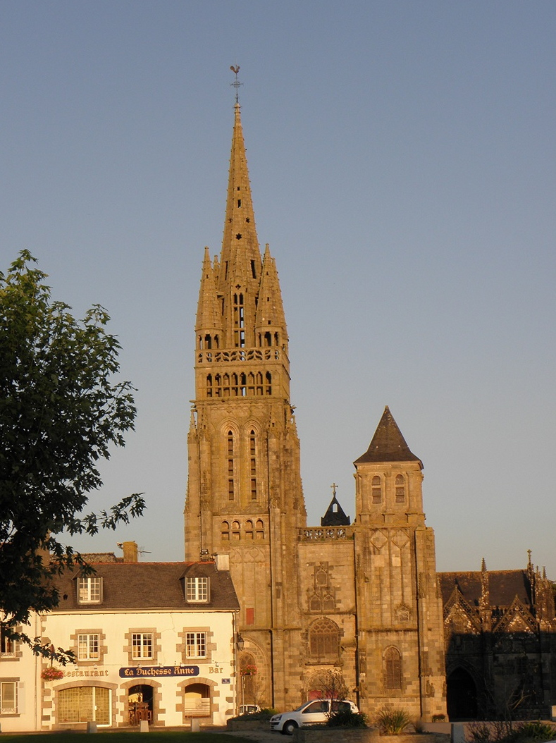 Façade occidentale de la basilique Notre-Dame du Folgoët (29).